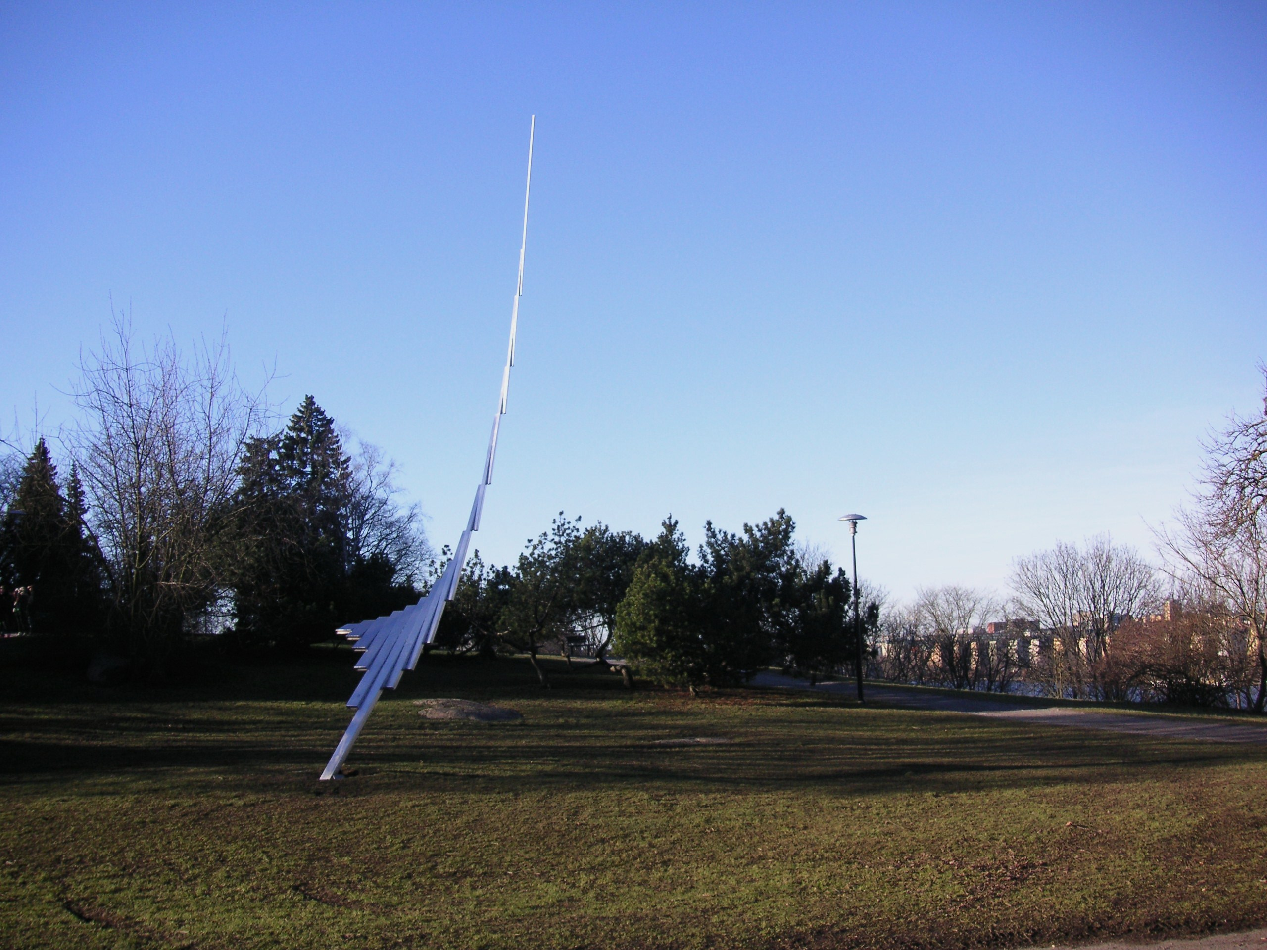 Skinnarviksparken i Stockholm med skulpturen "Progression" av Arne Jones